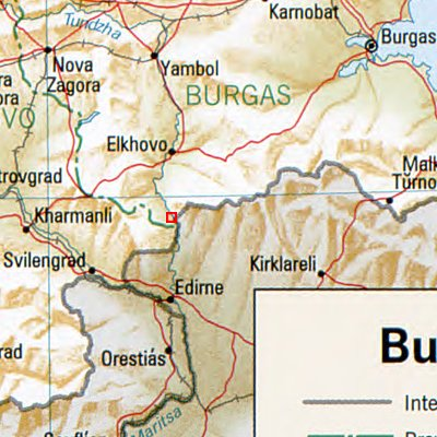 Lesowo - Lage des Ortes in Bulgarien